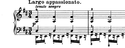 Compassos iniciais do segundo movimento da Sonata Op. 2 n. 2 de Beethoven